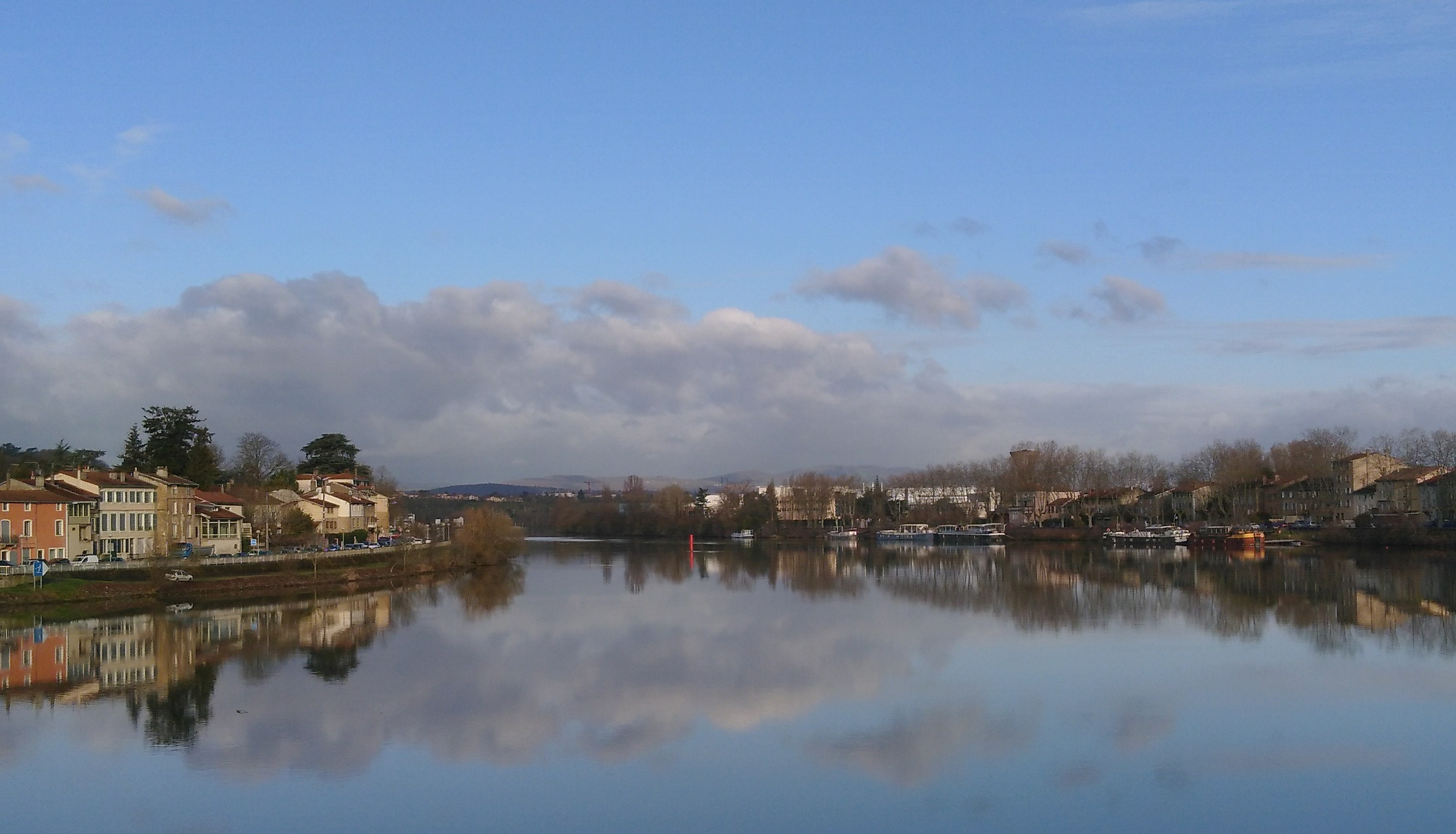 La Saône amont à Neuville-sur-Saône, vue du pont. À gauche de la photo (rive droite), le quartier de Villevert à Albigny-sur-Saône. À droite de la photo (rive gauche), le quartier du Four-à-Chaux à Neuville-sur-Saône.